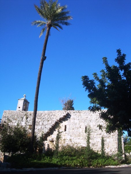 Saint Georges Church - Edde Jbeil